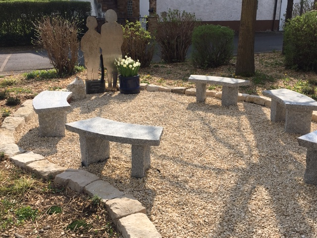 Garten der Erinnerung an die jüdischen Mitbewohner Hellsteins